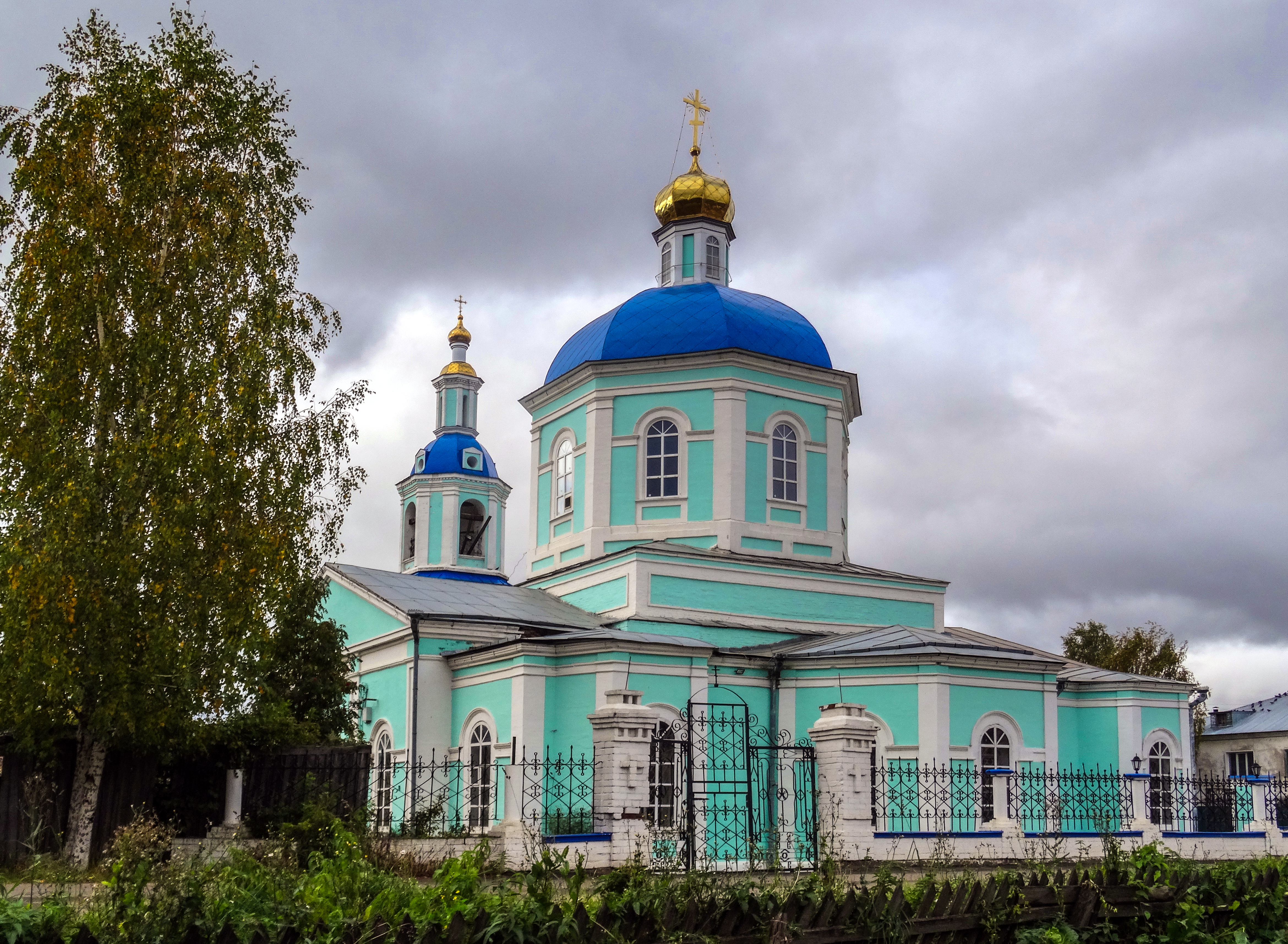 Церковь Успенская: улица Малькова, 9, Советск, Советский район, Кировская область